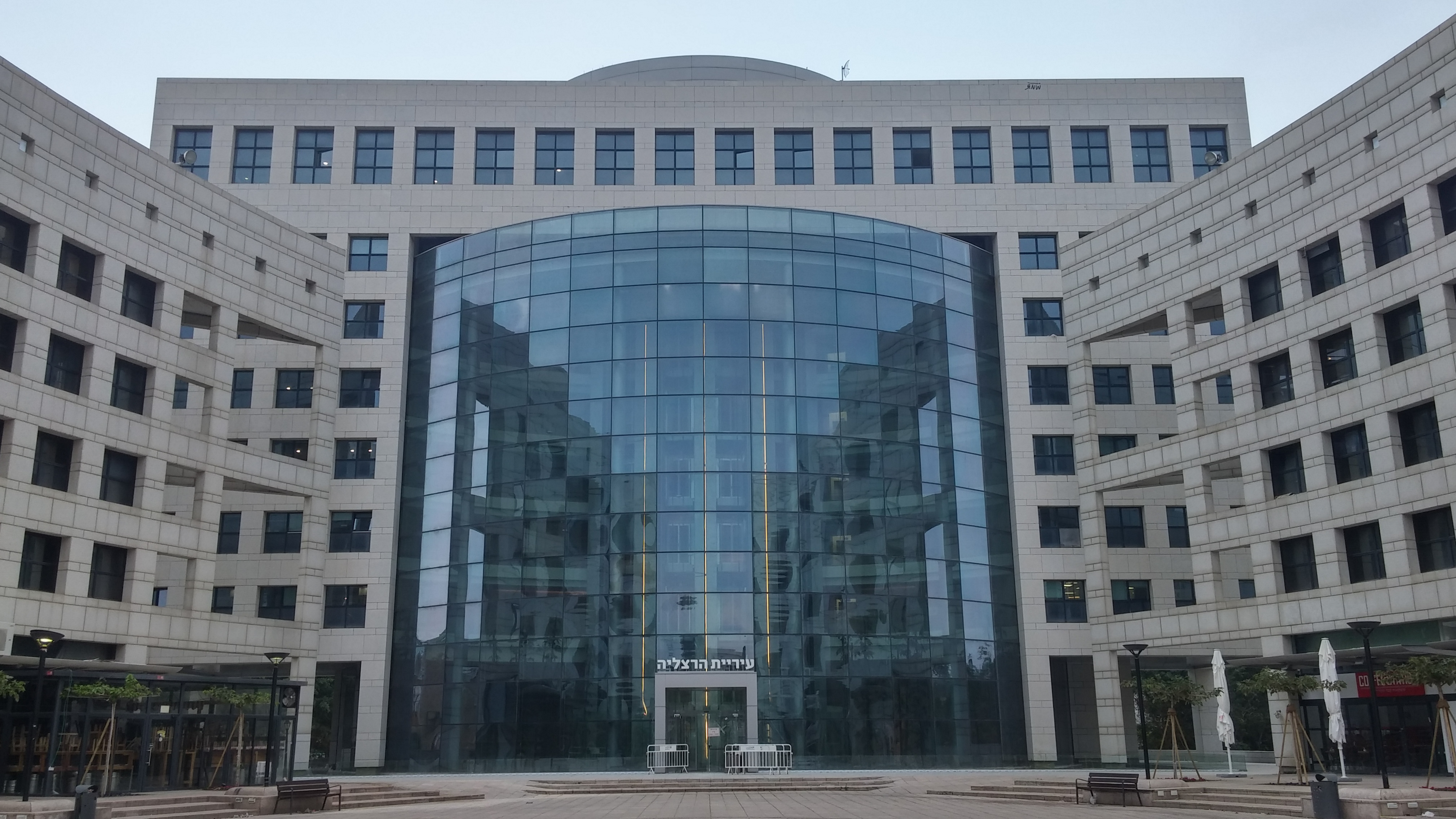 הרצליה - בית העירייה החדש